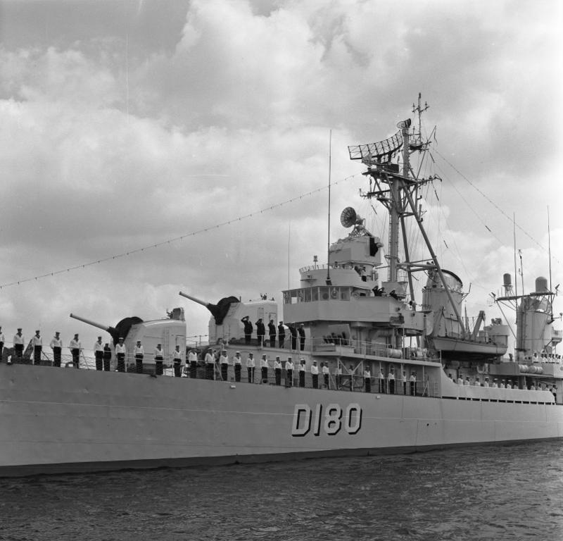 Kieler Woche 1962 Bundespräsident auf der "Ashanti" nimmt Parade von "Gorch Fock" deutschen und ausl. Kriegsschiffen ab